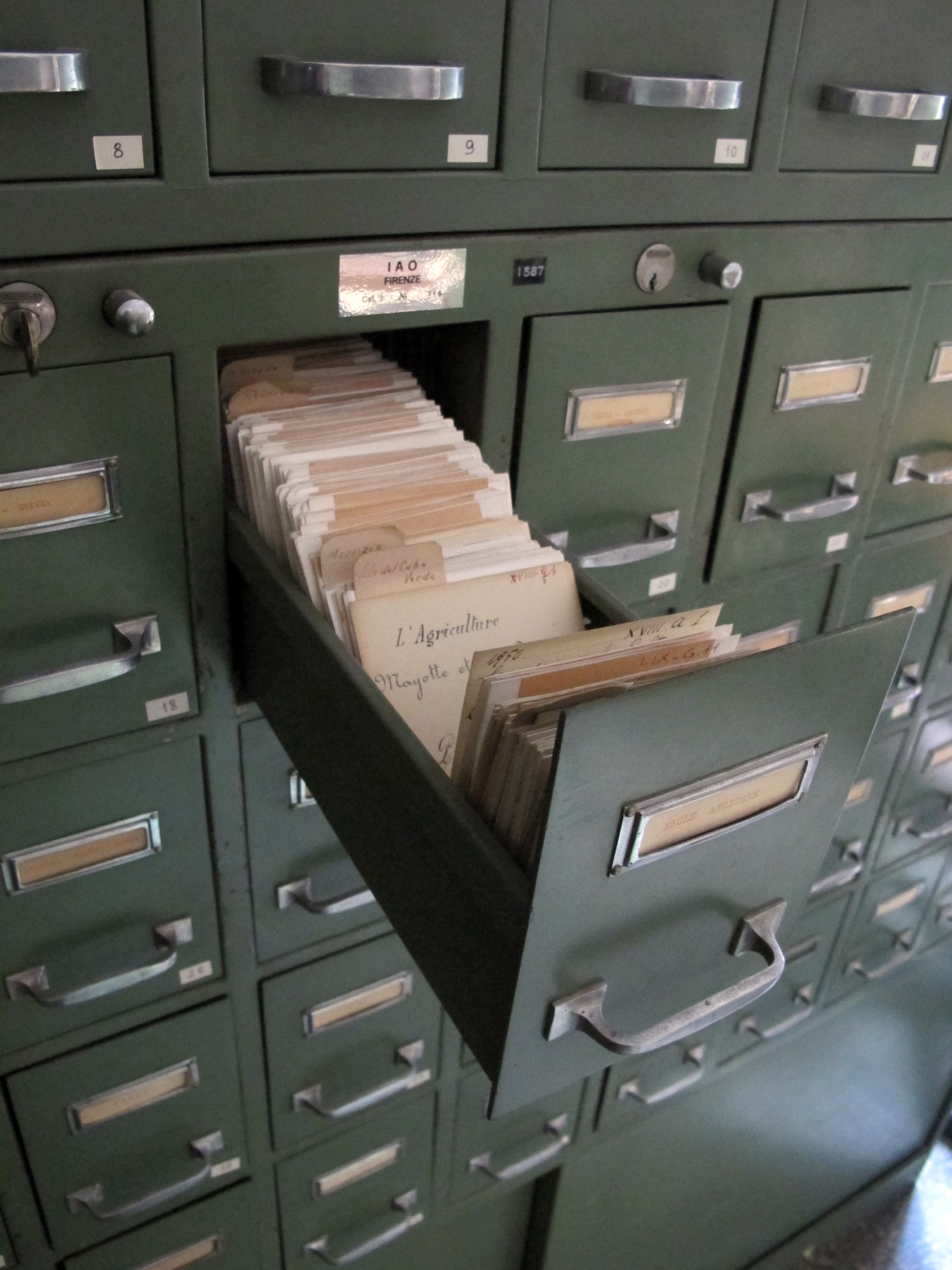 Istituto agronomico per l'oltremare, int., biblioteca, schedario